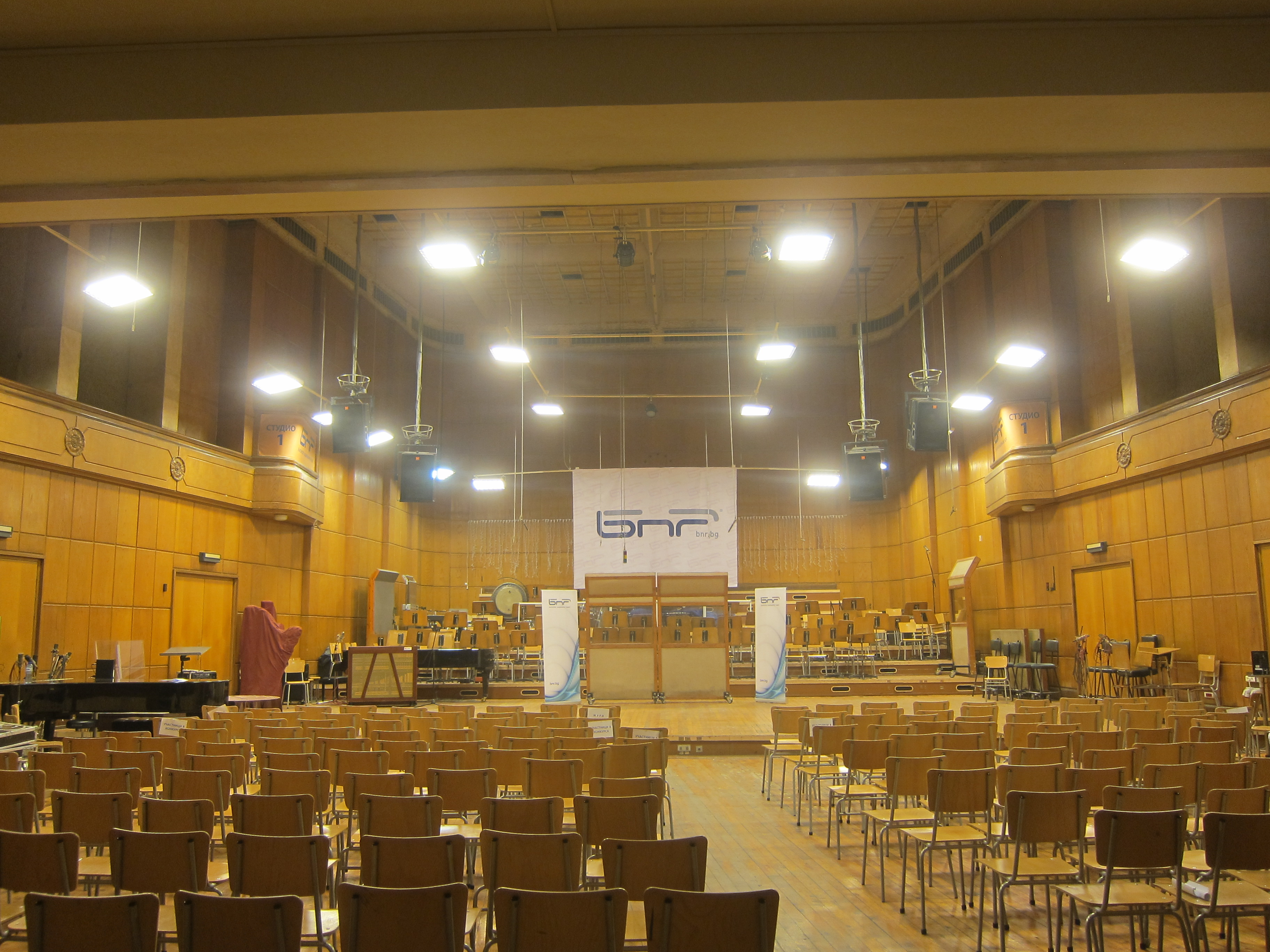 Студио 1 на Българското национално радио, мястото, където свири оркестърът на радиото.